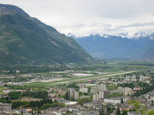 Selbstfotografiert; Unter GNU-FDL gestellt; Sion, Notre-Dame de Valère; 2002